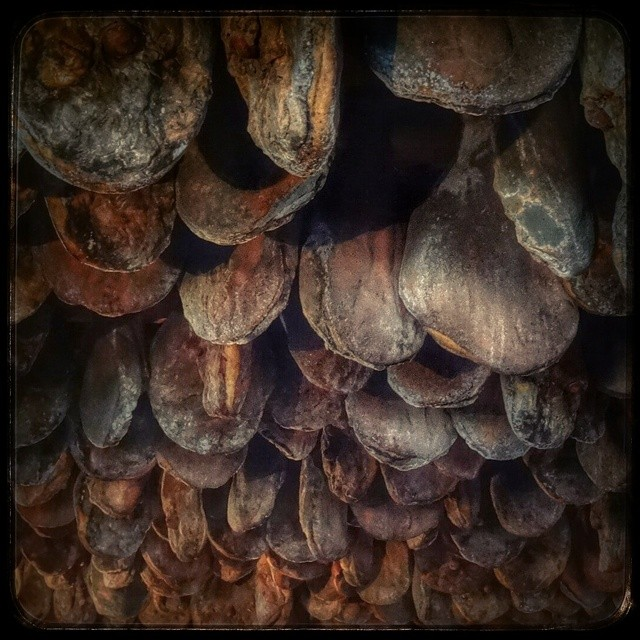 Donde viven los jamones